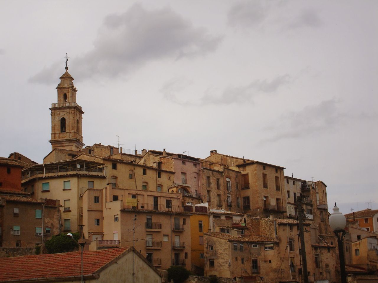 Bocairent - Vall d'Albaida - País Valencià